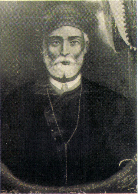 Περακάκης Νίκος, Βουλευτής στο κοινοβούλιο των Χανίων